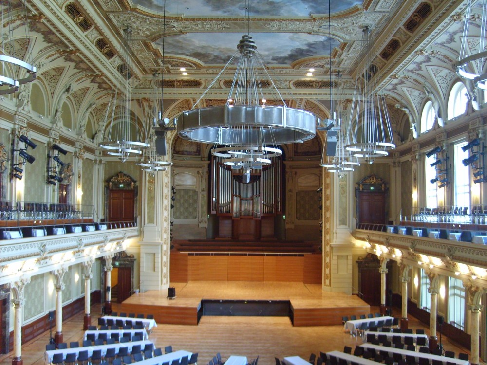 Großer Saal der Wuppertaler Stadthalle